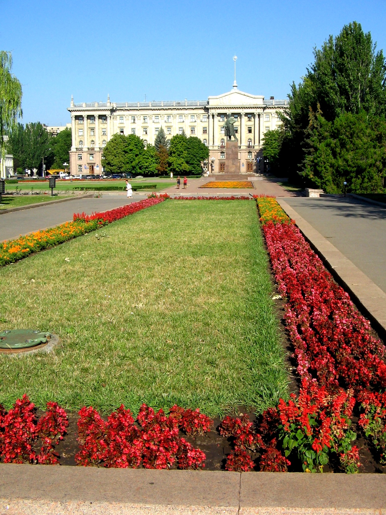 Площадь у администрации (Николаев)